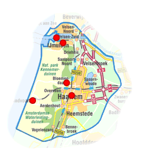 Plaatje uit eigen collectie. Wordt op diverse websites over kennemerland gebruikt.